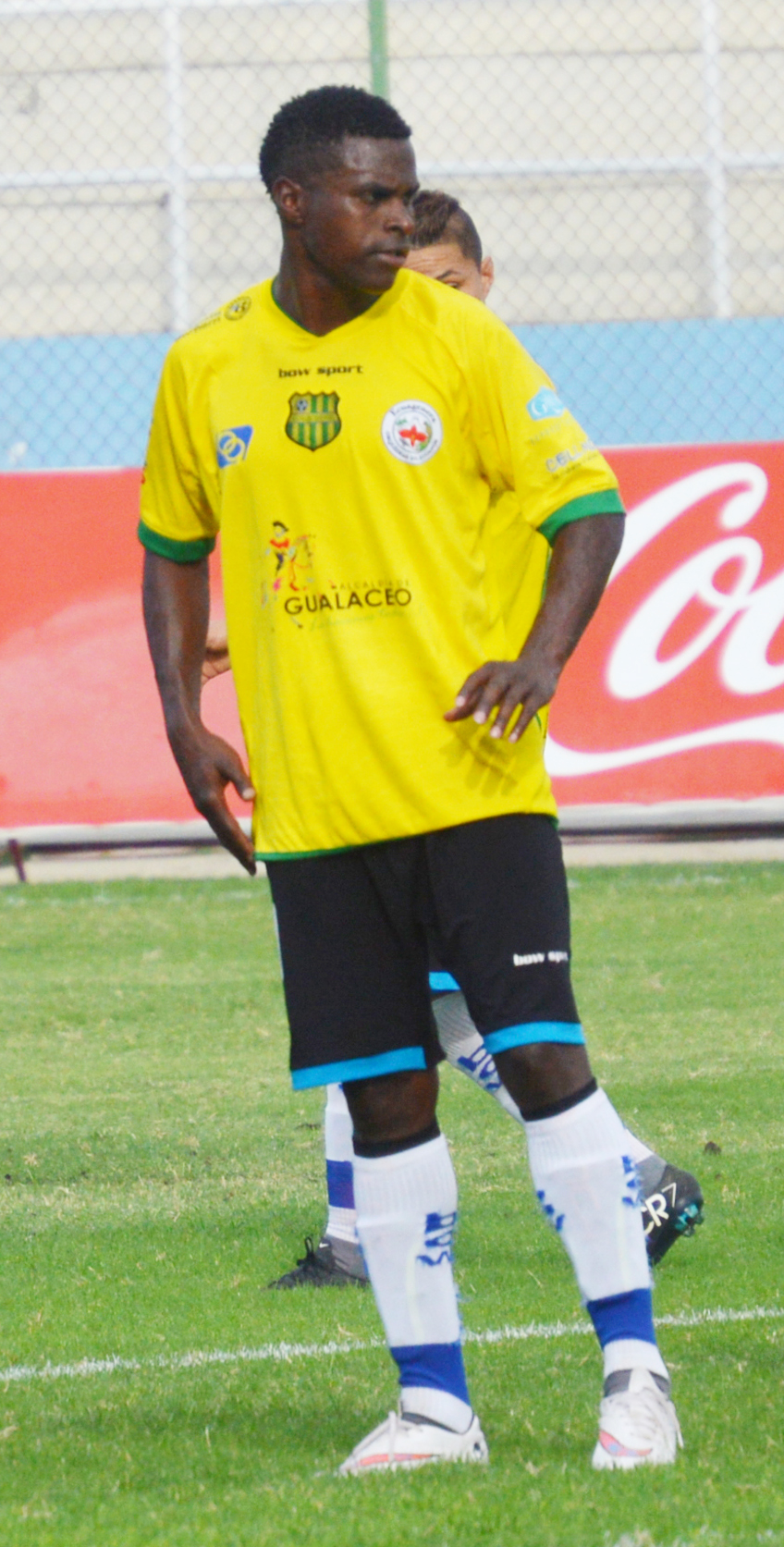 Néstor Gerrero en Gualaceo en 2015